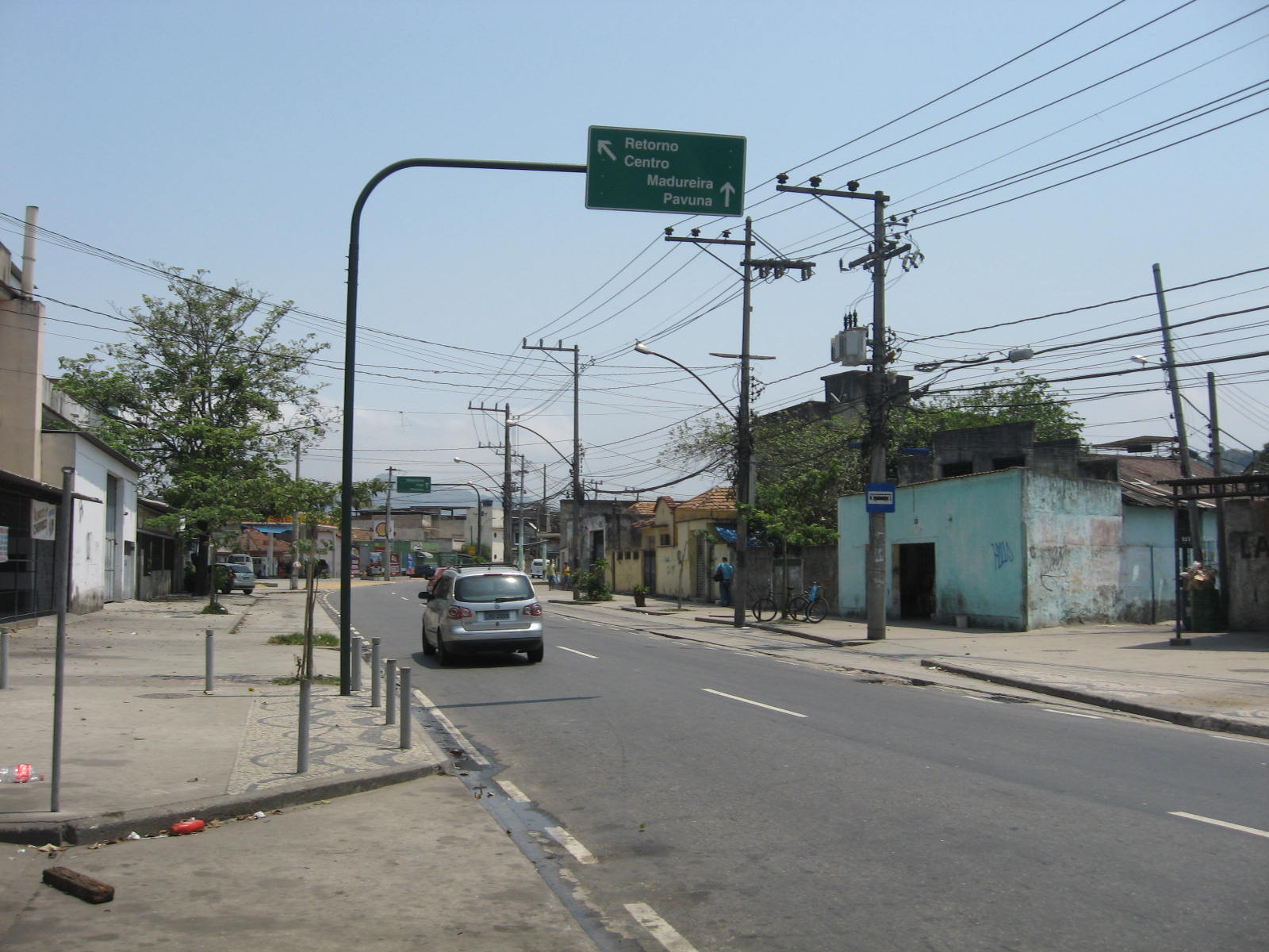 Detalhe de Inhaúma, bairro do Rio de Janeiro.